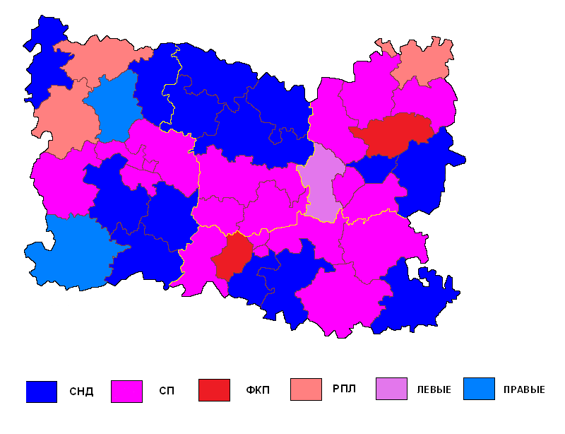 Состав генерального Совета департамента Уаза в 2011-2014 гг.